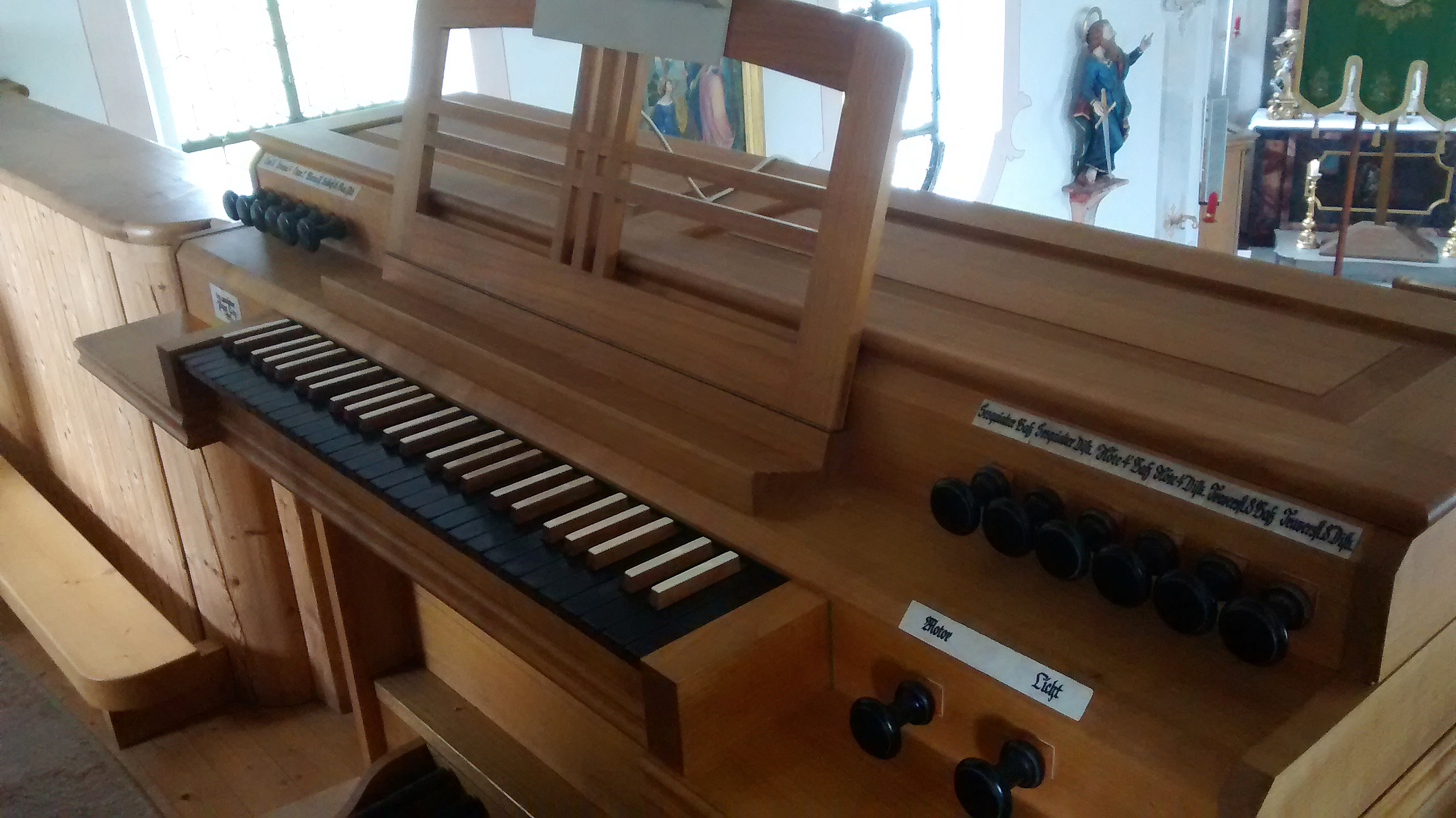 Organ of Heilig Kreuz (Mindelaltheim)